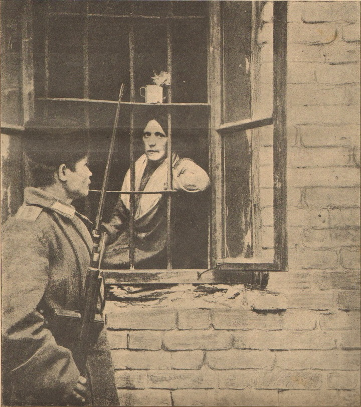 Mariya Spiridónova en 1906 en prisión preventiva, según